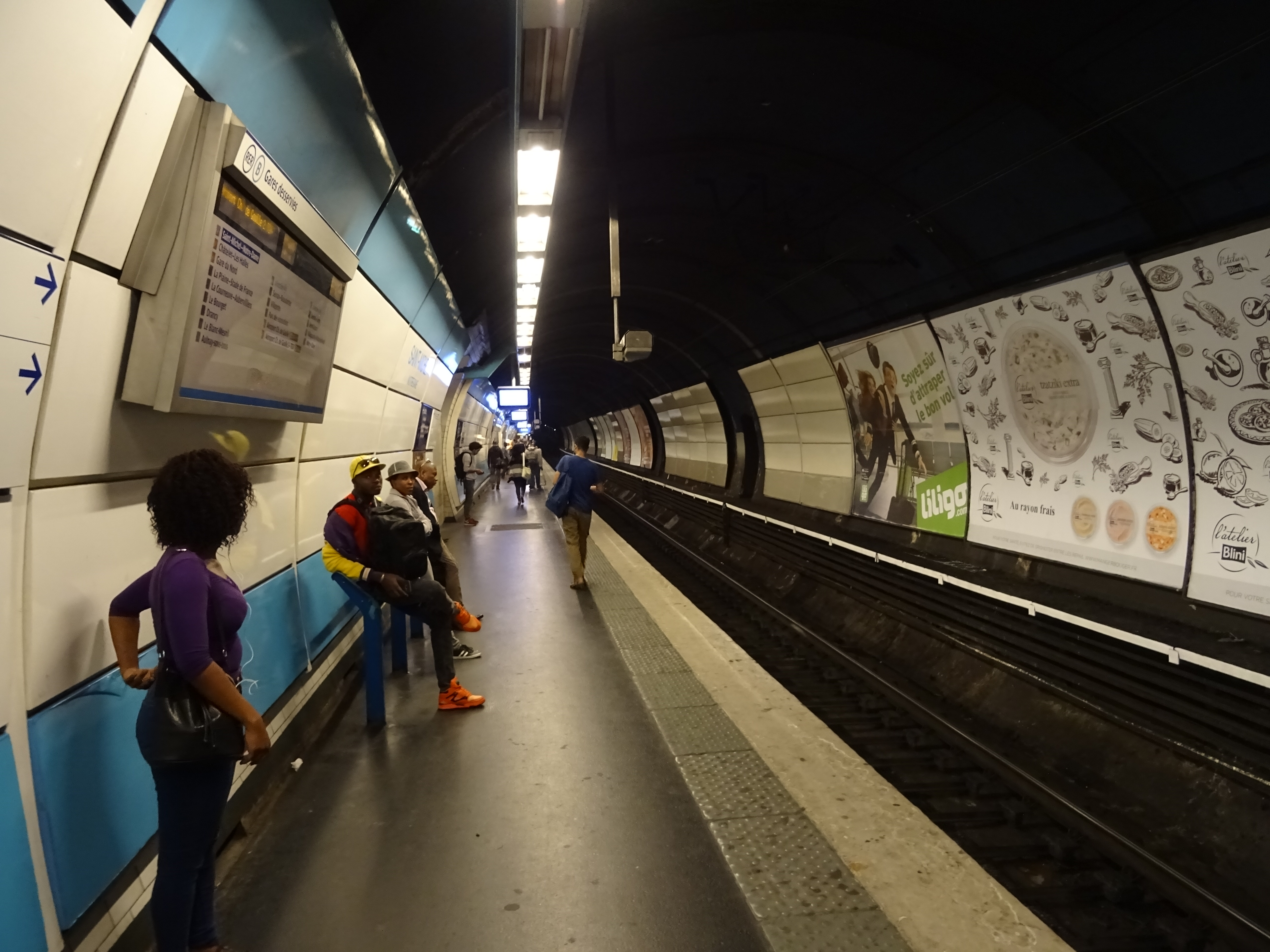 Quai RER B direction Châtelet vu côté arrivée du train